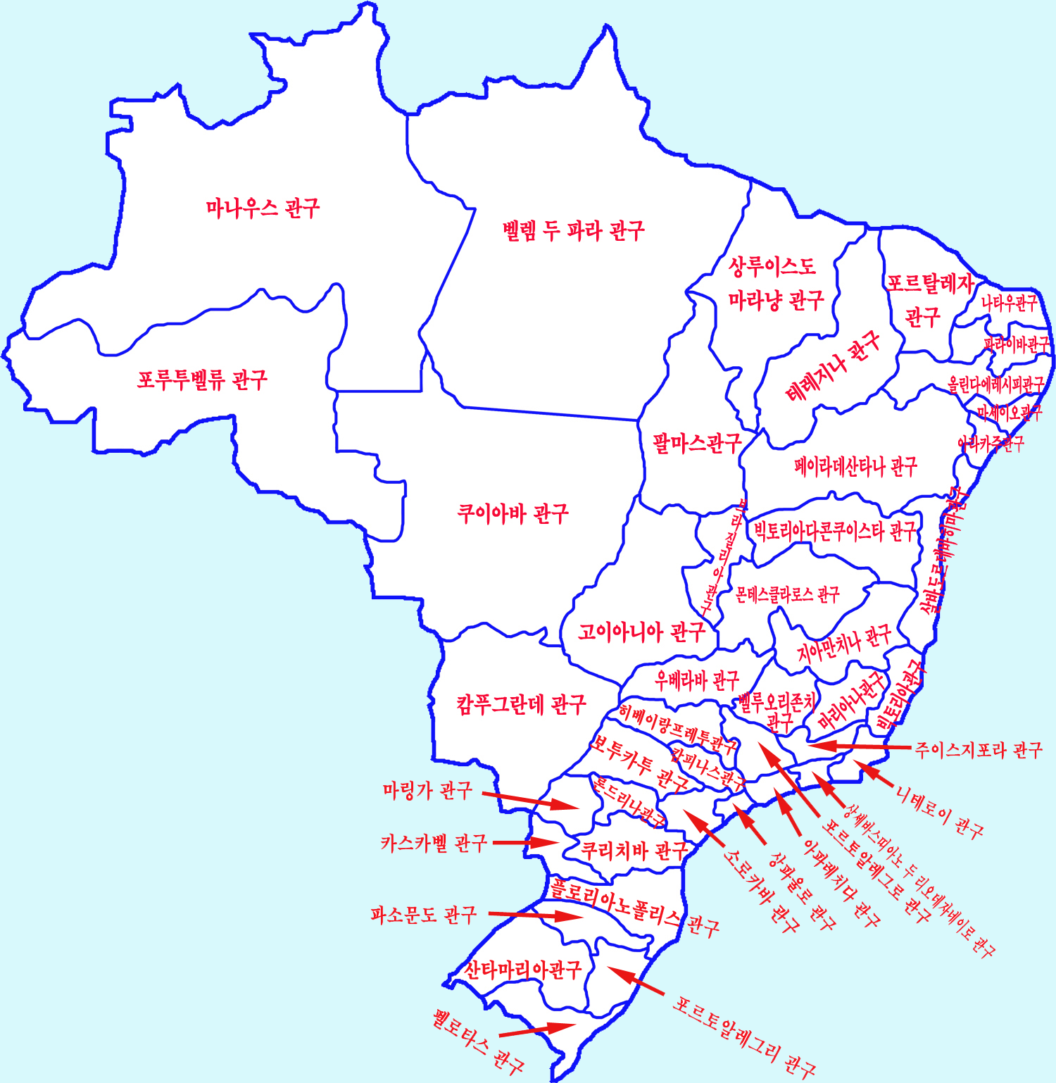 브라질의 로마 가톨릭교구도